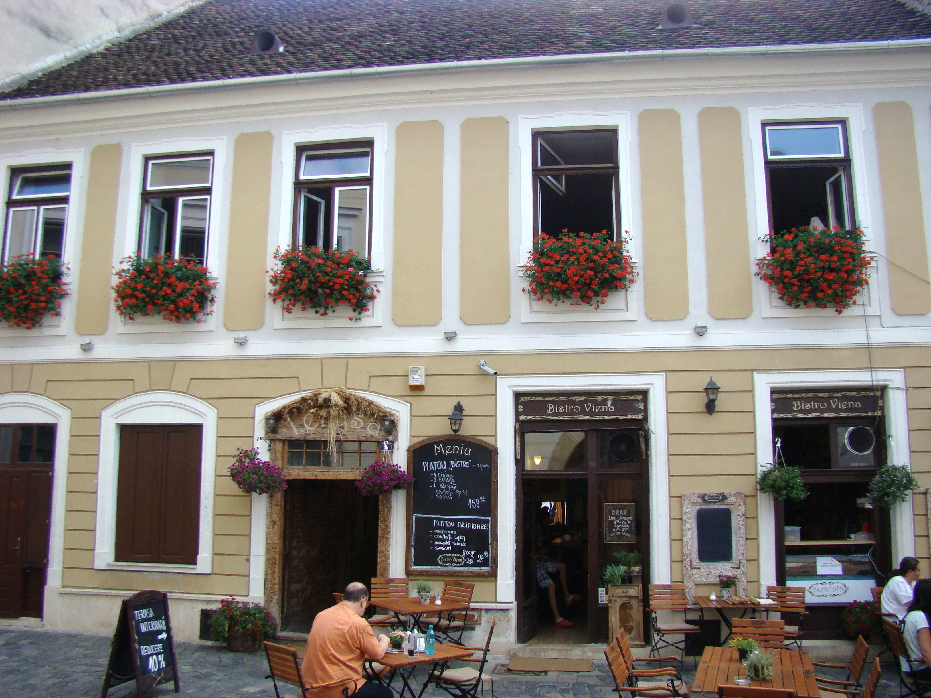 Clădire monument istoric Matei Corvin, nr.3